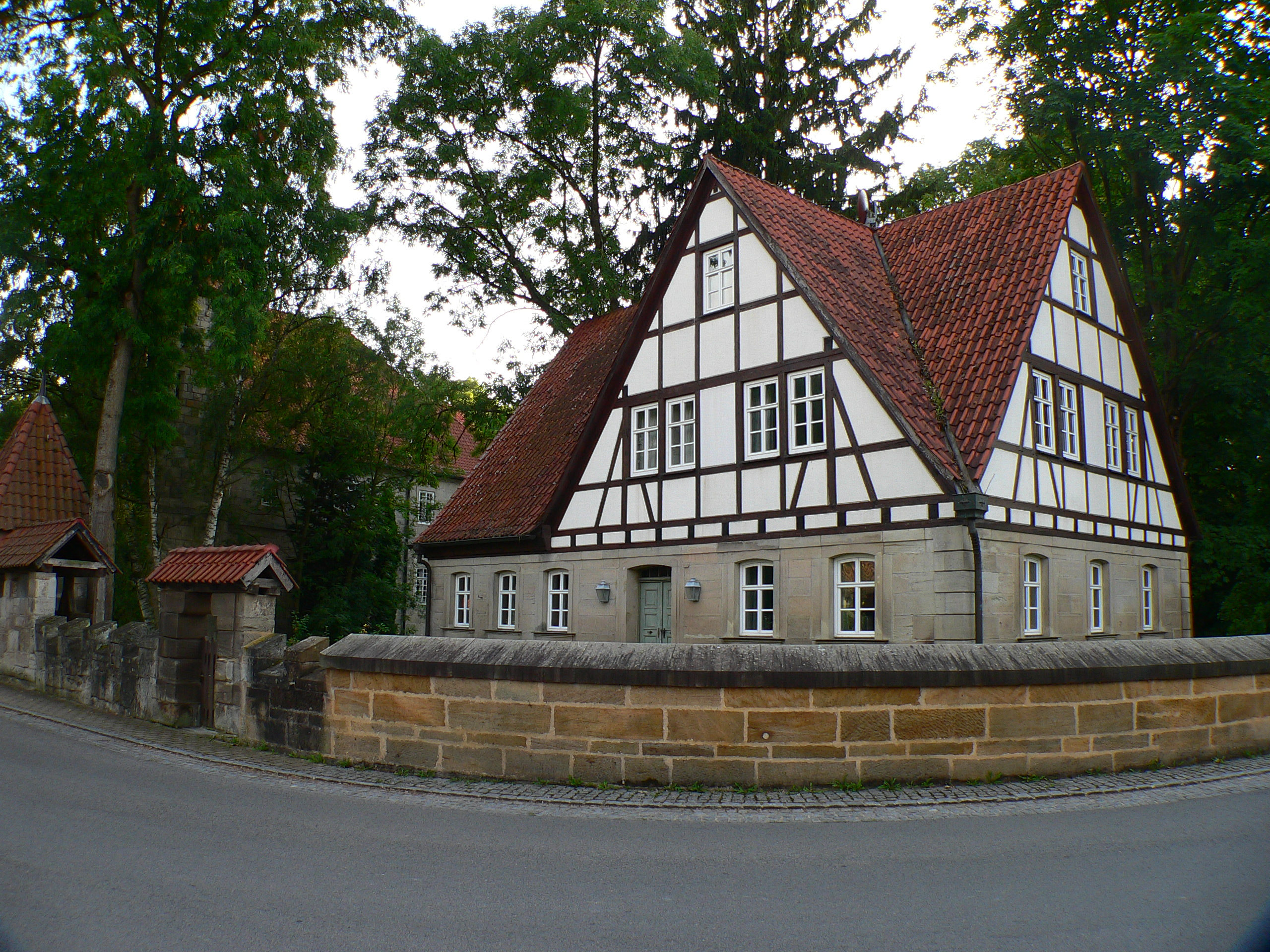 Wasserschloss in Untersiemau, Kreis Coburg, Bayern